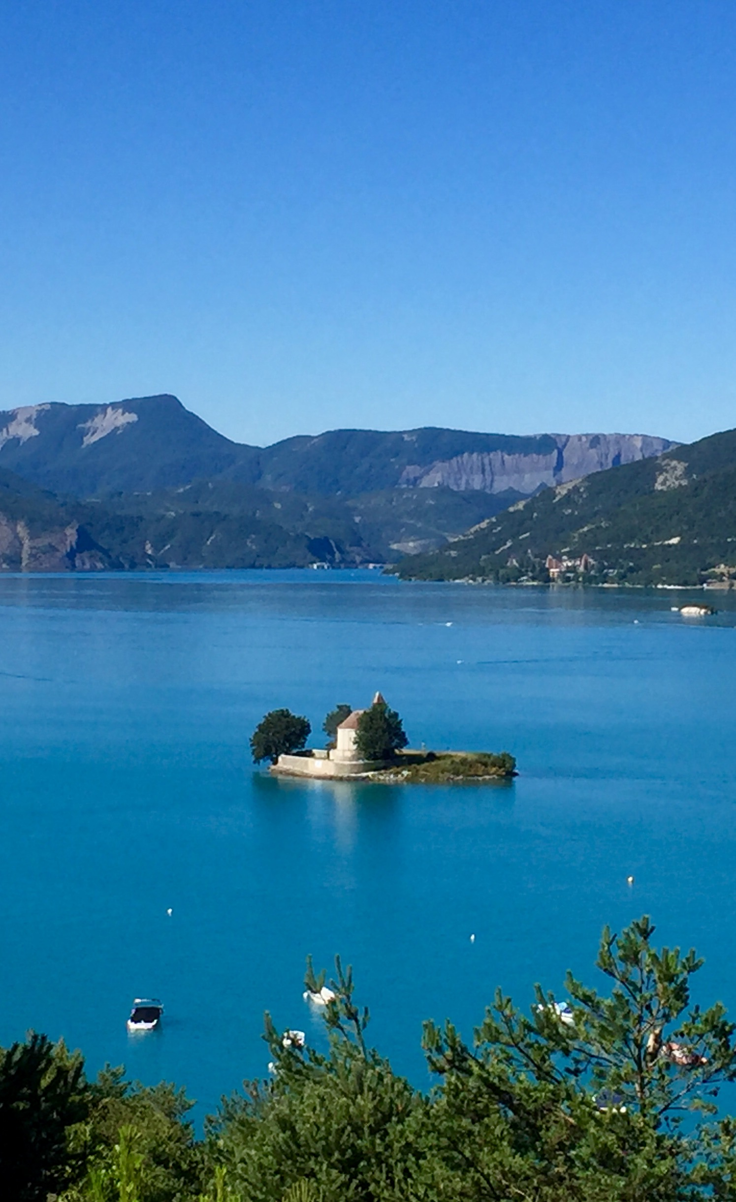 Lac de Serre-Ponçon